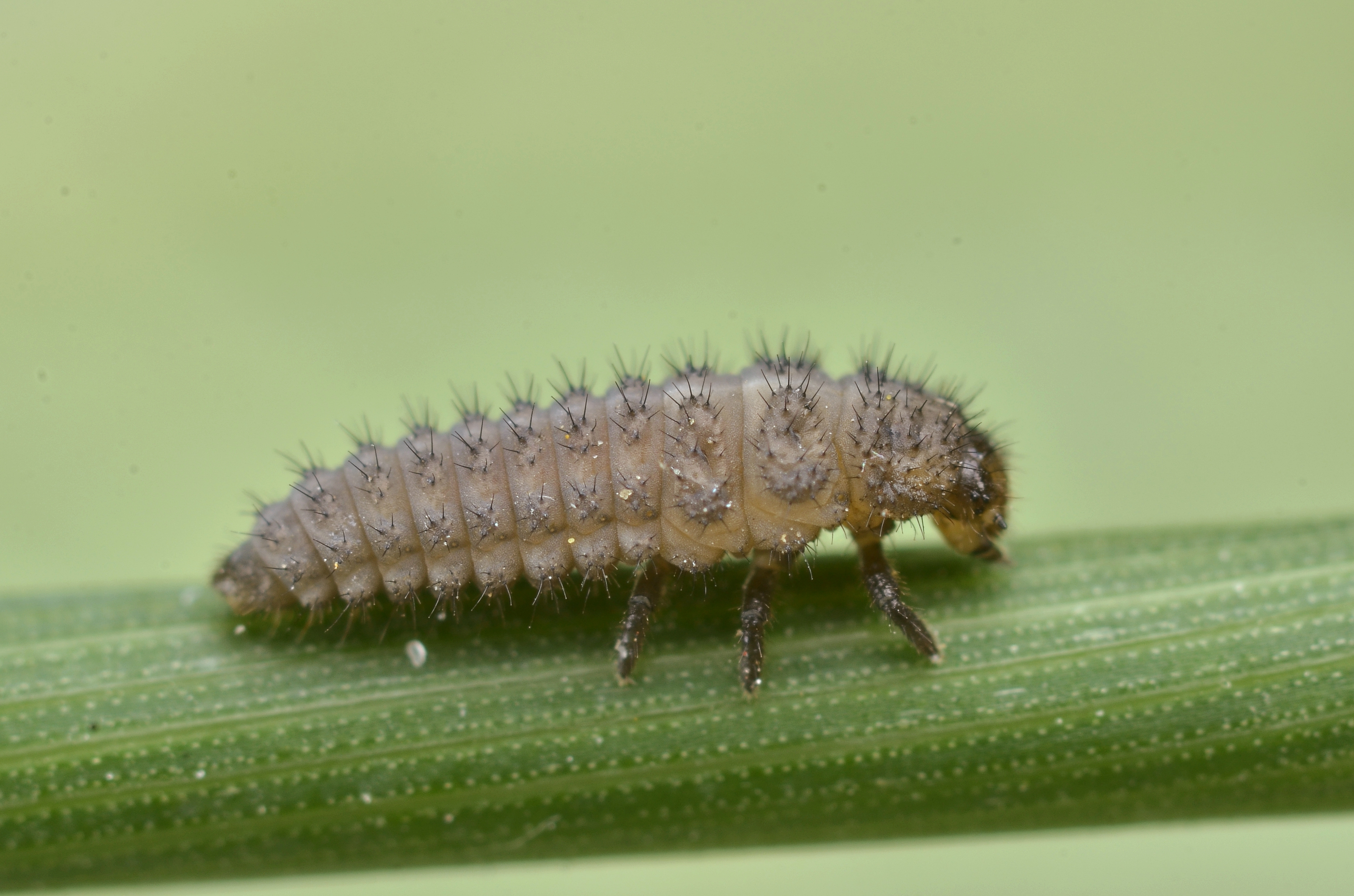 Tytthaspis sedecipunctata larvae